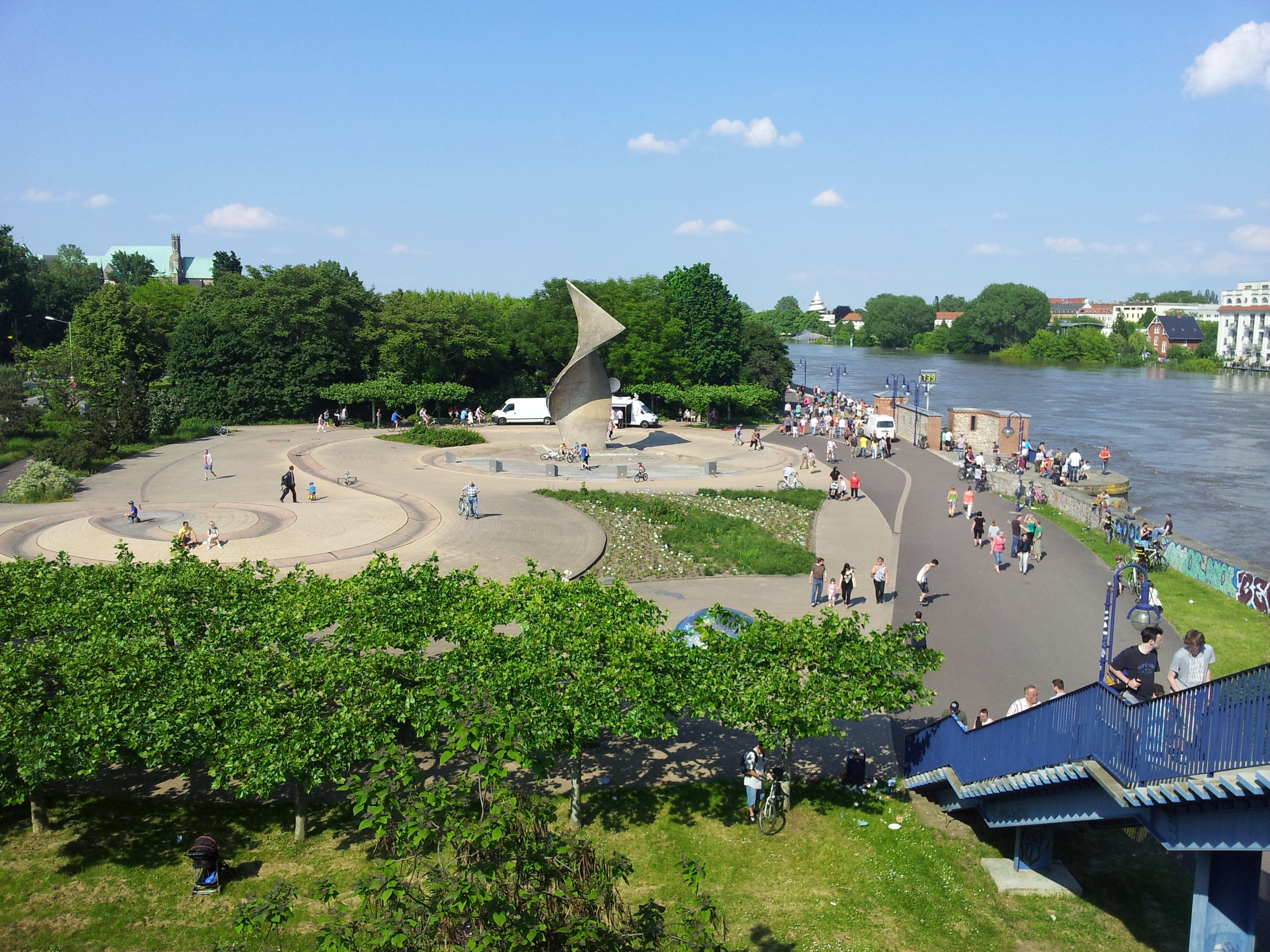 Der sogenannte "Petri" (Elbuferpromenade) beim Hochwasser 2013